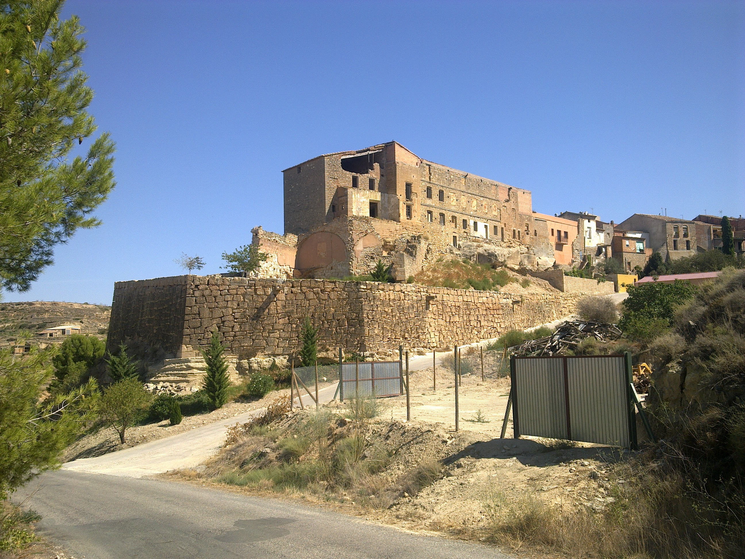 Gòtic segles XII - XV, XVI